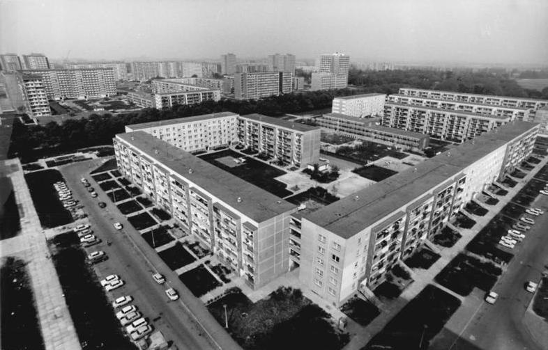 Leipzig, Grünau, Wohnblocks ADN-ZB Gahlbeck 1.7.86 Leipzig: 10 Jahre Grünau-Zweitgrößtes Neubaugebiet der DDR ist Leipzig-Grünau. Seit Beginn der Bauarbeiten vor zehn Jahren entstanden hier auf einer Fläche von 400 Hektar 35.000 Wohnungen. Dazu kommen 26 Schulen, 15 Sporthallen, 24 Kinderkombinationen, fünf Ambulanzen, neun Kaufhallen, 37 Dienstleistungs- und 26 gastronomische Einrichtungen. - siehe auch 1986-0701-2 und 3 N - Im Zeitraum von 1971 bis 1986 entstanden 2, 4 Millionen neugebaute bzw. modernisierte Wohnungen. Damit verbesserten sich die Wohnverhältnisse für 7, 2 Millionen Bürger. Mit mehr als 400 Wohnungen für je 1.000 Einwohner und durchschnittlich 26 Quadratmeter Wohnfläche pro Person wurde ein international beachtliches Niveau erreicht.